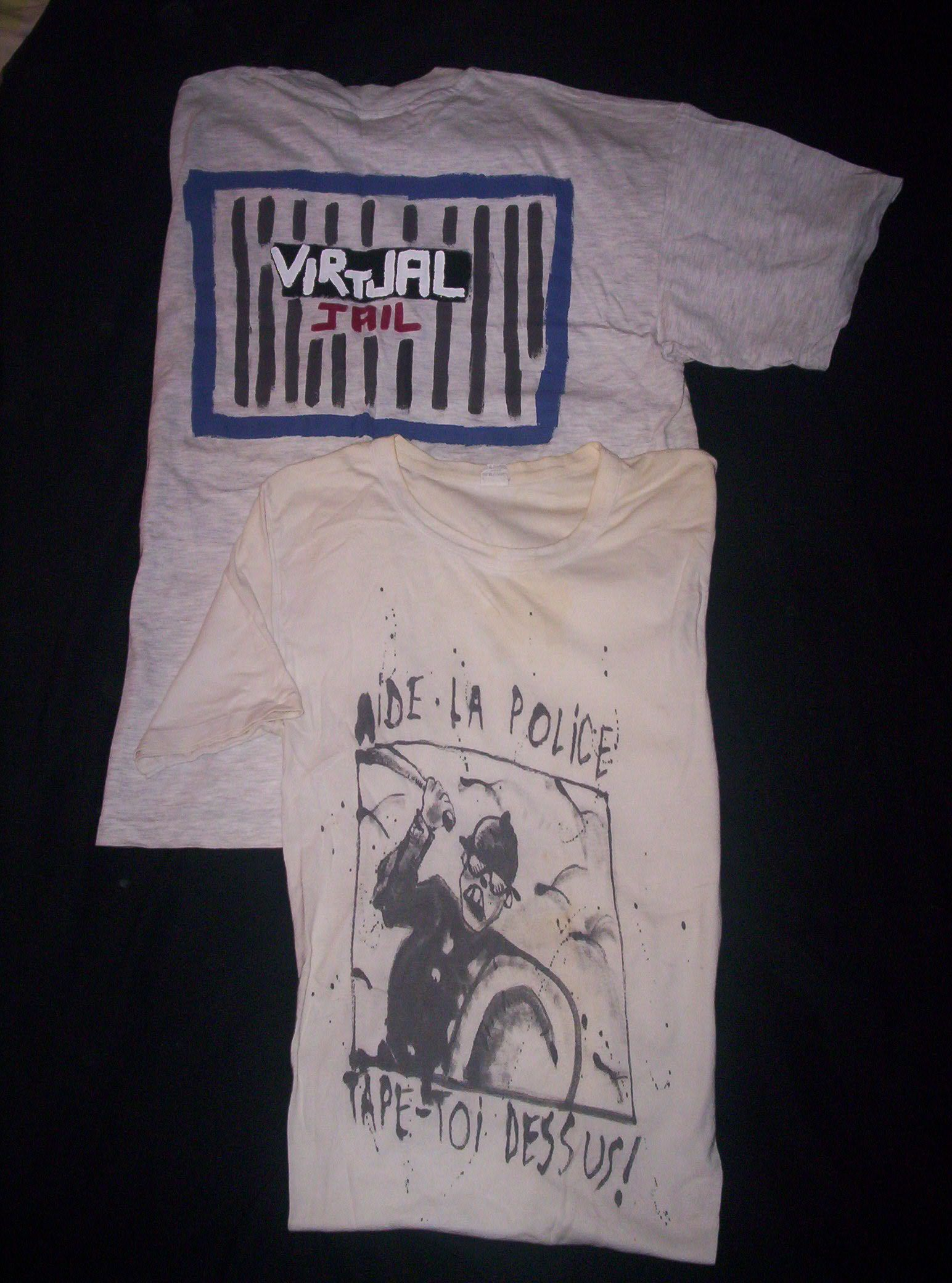 Tee-shirts personnalisés